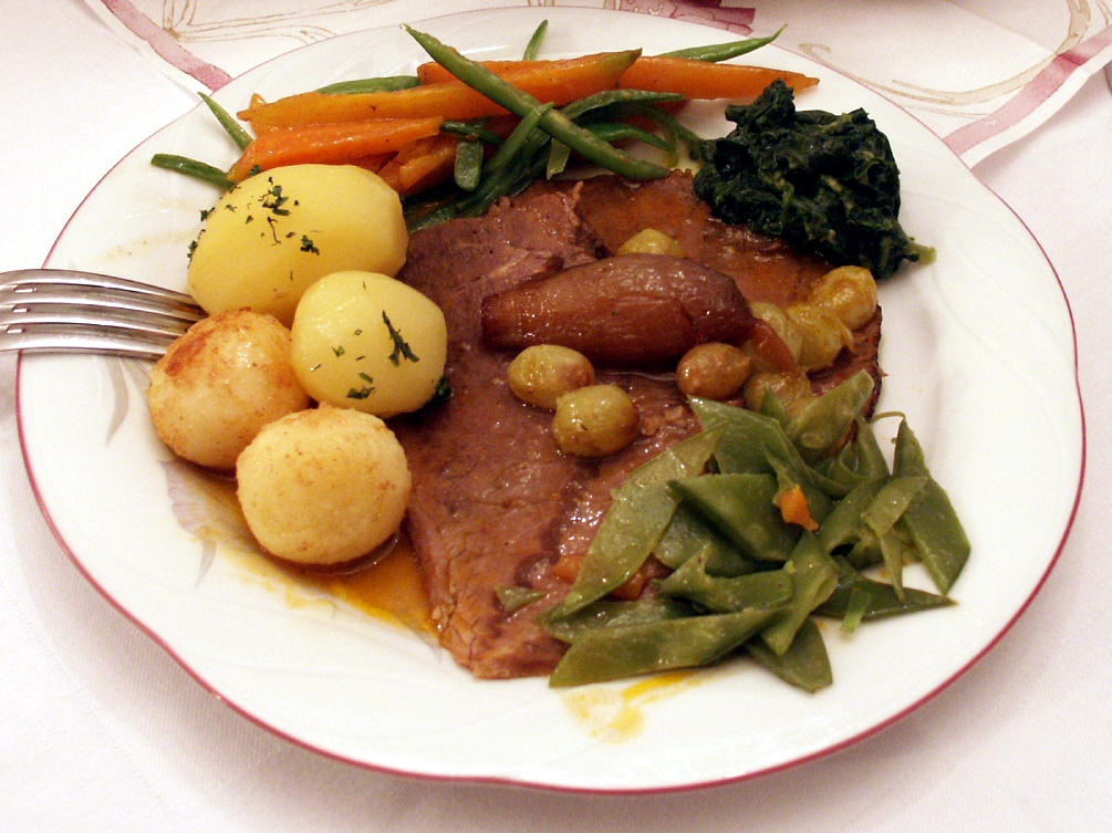 Norddeutscher Rinderbraten